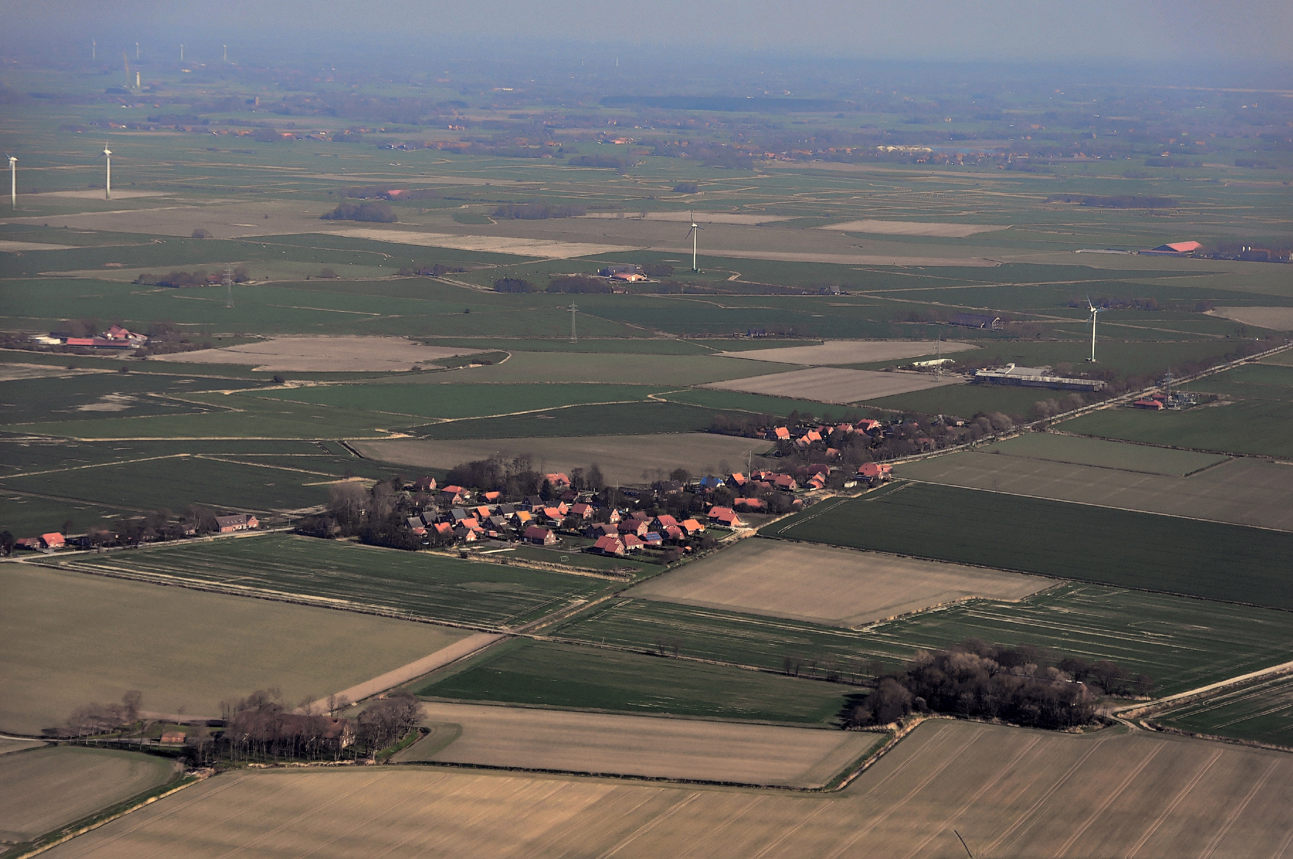 Luftbilder von der Nordseeküste 2013-05: Hagermarsch von NW